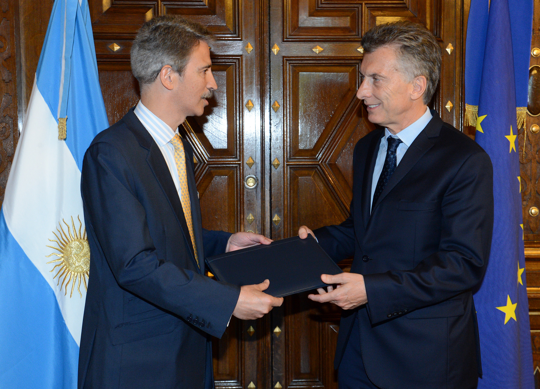 El presidente Mauricio Macri recibió ayer las cartas credenciales de los embajadores de Rumania, Noruega, Eslovenia, Polonia, Serbia, Nueva Zelandia y de la Unión Europea. El acto se realizó este mediodía en el despacho presidencial, donde también asistió la canciller Susana Malcorra. Presentaron sus cartas Carmen Liliana Podgorean (Rumania); Jostein Leiro (Reino de Noruega); Jadranka Šturm Kocjan (Eslovenia); Marek Pernal (Polonia); Jela Bacovic (Serbia); Raylene Liufalani (Nueva Zelanda) y José Ignacio Salafranca (Delegación de la Unión Europea).